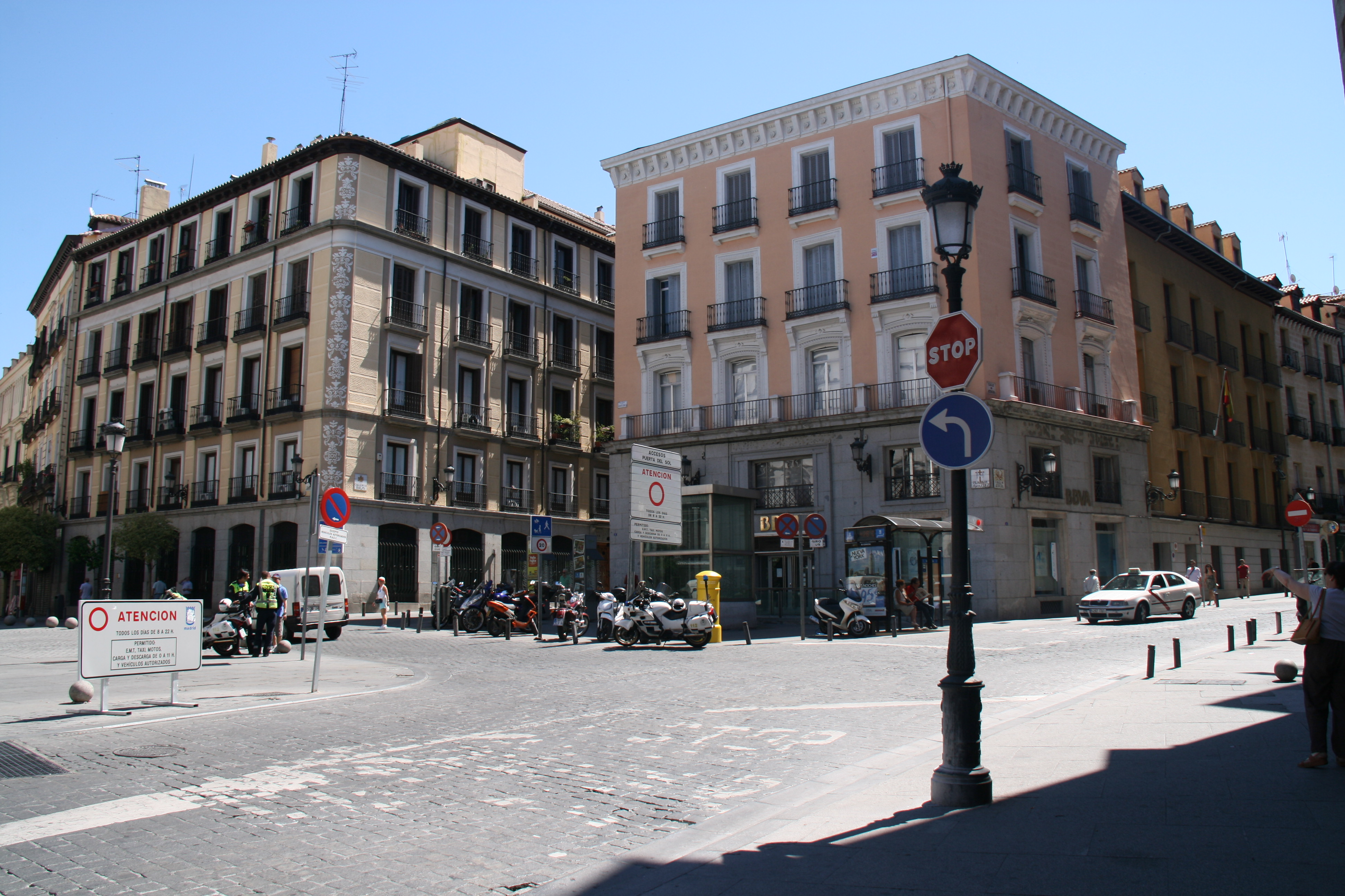 Plaza de Santa Cruz - (2013)